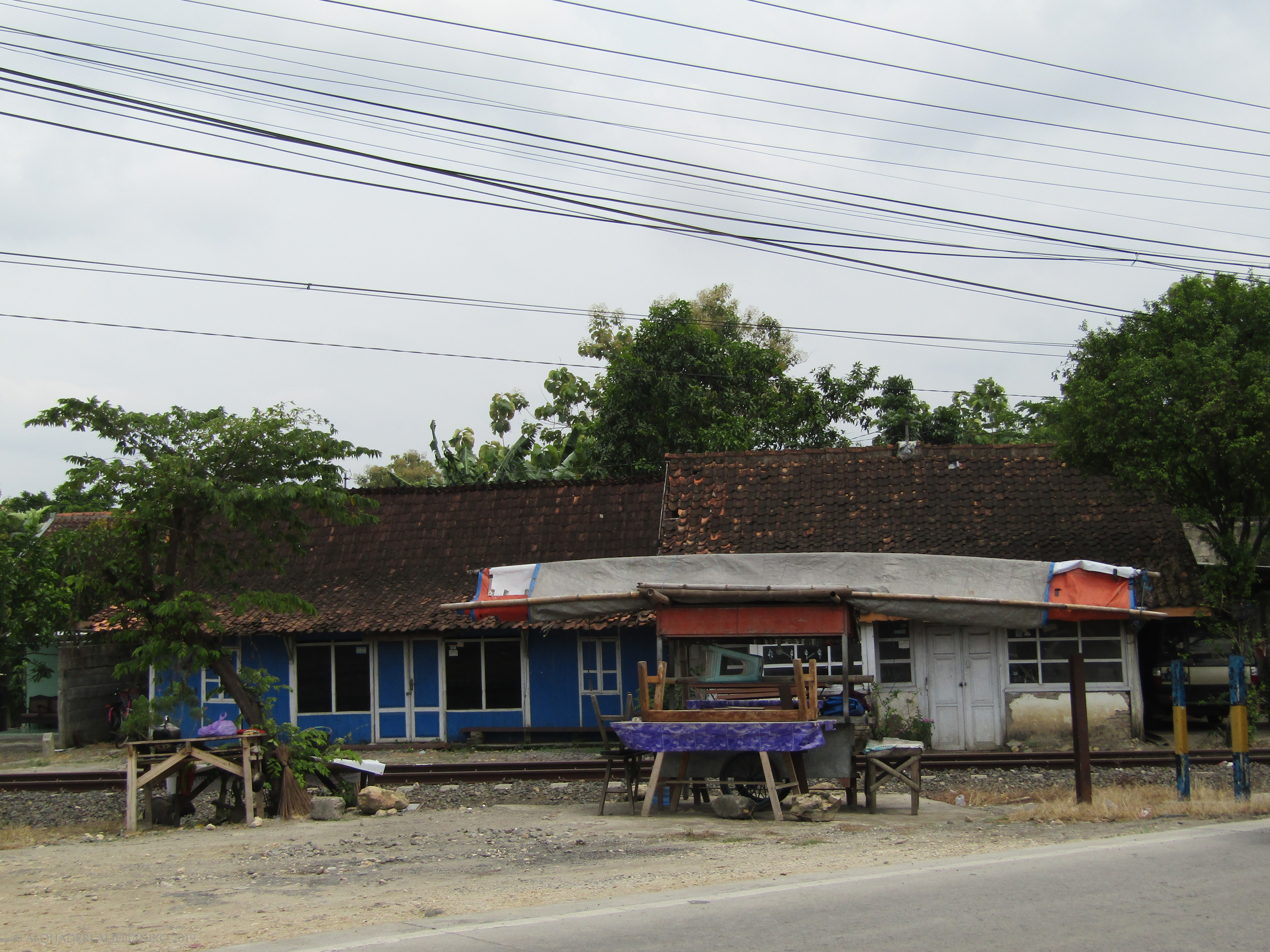 Bekas pos perpotongan Ngemplak, 2019